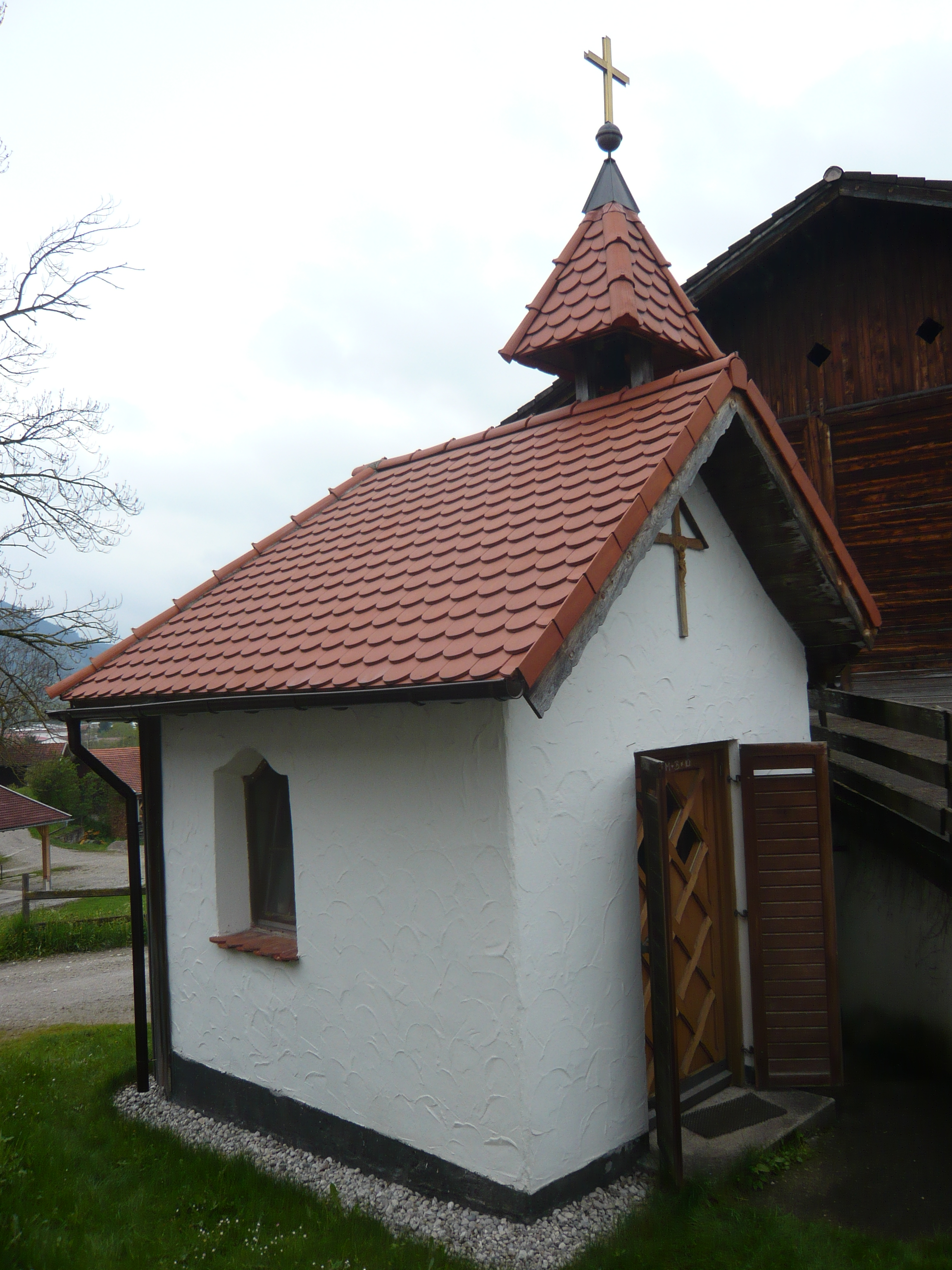 Bruder Georg-Kapelle, Pfronten-Kreuzegg, Landkreis Ostallgäu